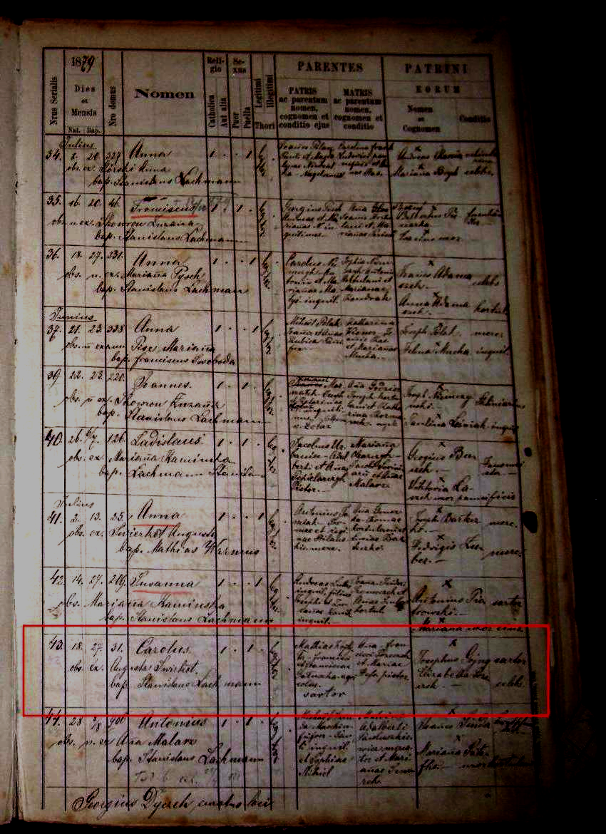 Metryka urodzenia Karola Wojtyła -seniora. Ojca św. pp. JP II